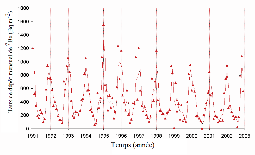 Taux de béryllium 7 déposé par mois au Japon. Données issues de M. Yamamoto et. al. Journal of Environmental Radioactivity, 2006, 86, 110-131. Version française de file:Be7fromcosmicrays.png